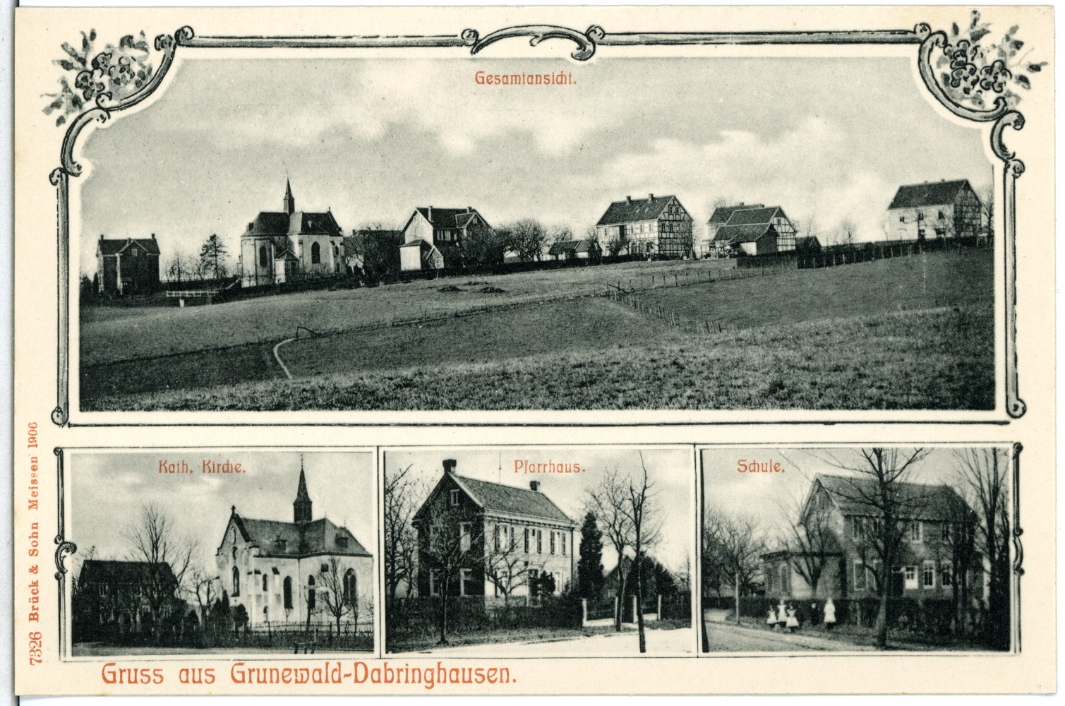 Grunewald; Ortsansichten von Grunewald - Dabringhausen This postcard is from publisher Brück & Sohn in Meißen ( postcard has a unique number 07326 and is available in a higher resolution at the publisher. This images was uploaded in a cooperation project between Wikipedians and the publisher.